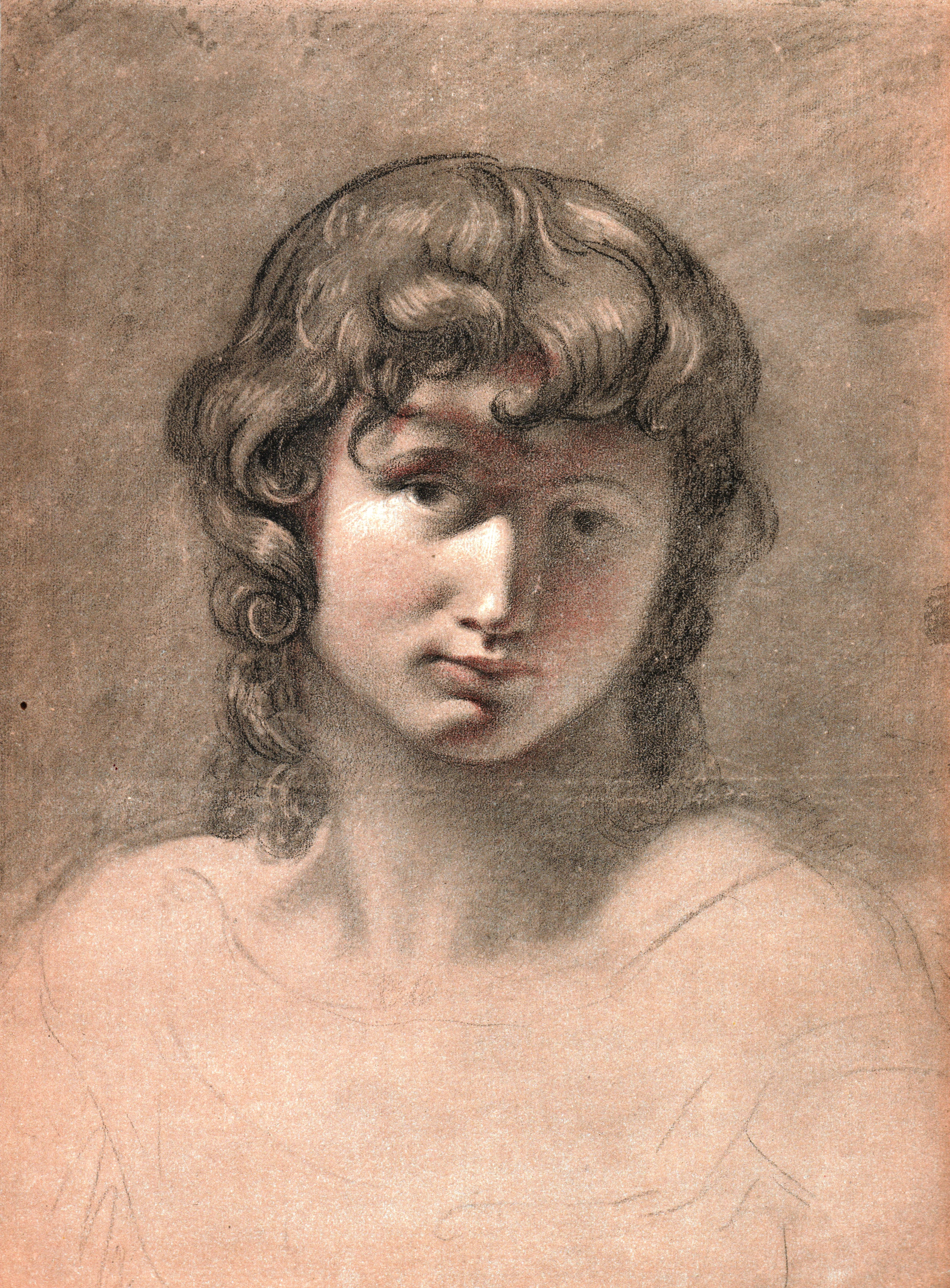 Ein Mädchenkopf, dreifarbige Kreidezeichnung, Schriften der Goethe-Gesellschaft 25, Blatt 25